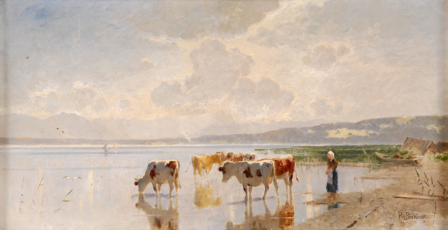 Richard von Poschinger (1839–1915): Am Chiemseeufer. Signiert. Öl/Holz, 37 x 71 cm